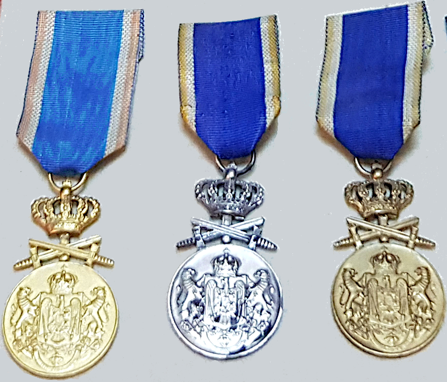 Die drei Klassen des rumänischen Treudienst-Medaille“ (Medalia "Serviciul Credincios") in Gold, Silber und Bronze, in der Ausführung 1932.